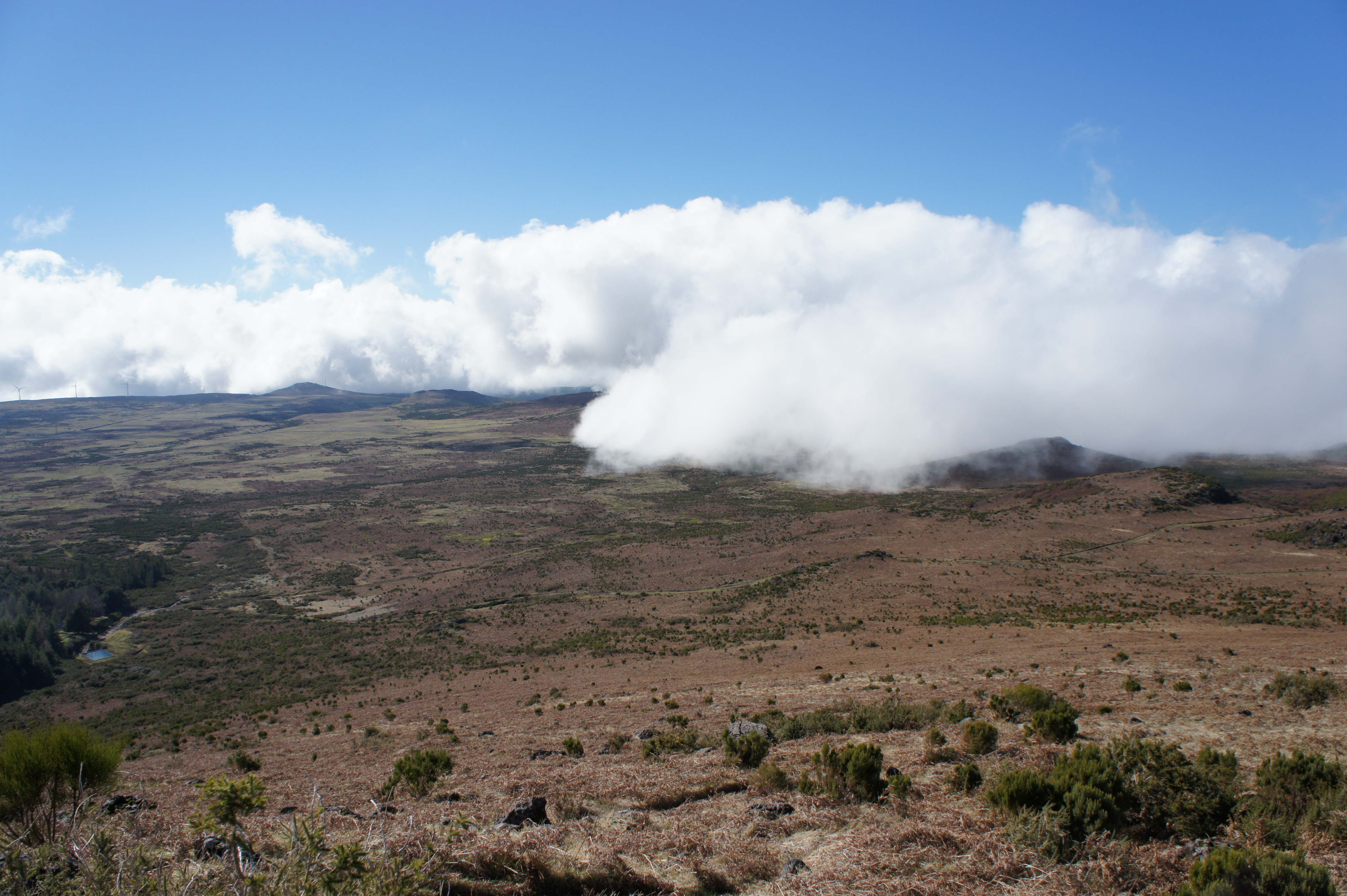 Wolken ziehen über die Hochebene Paúl da Serra